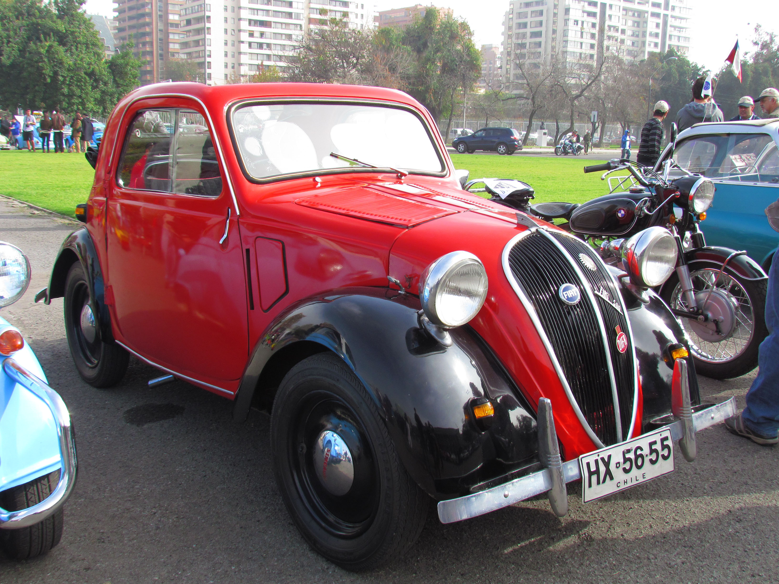 Patrimonio sobre ruedas 2013